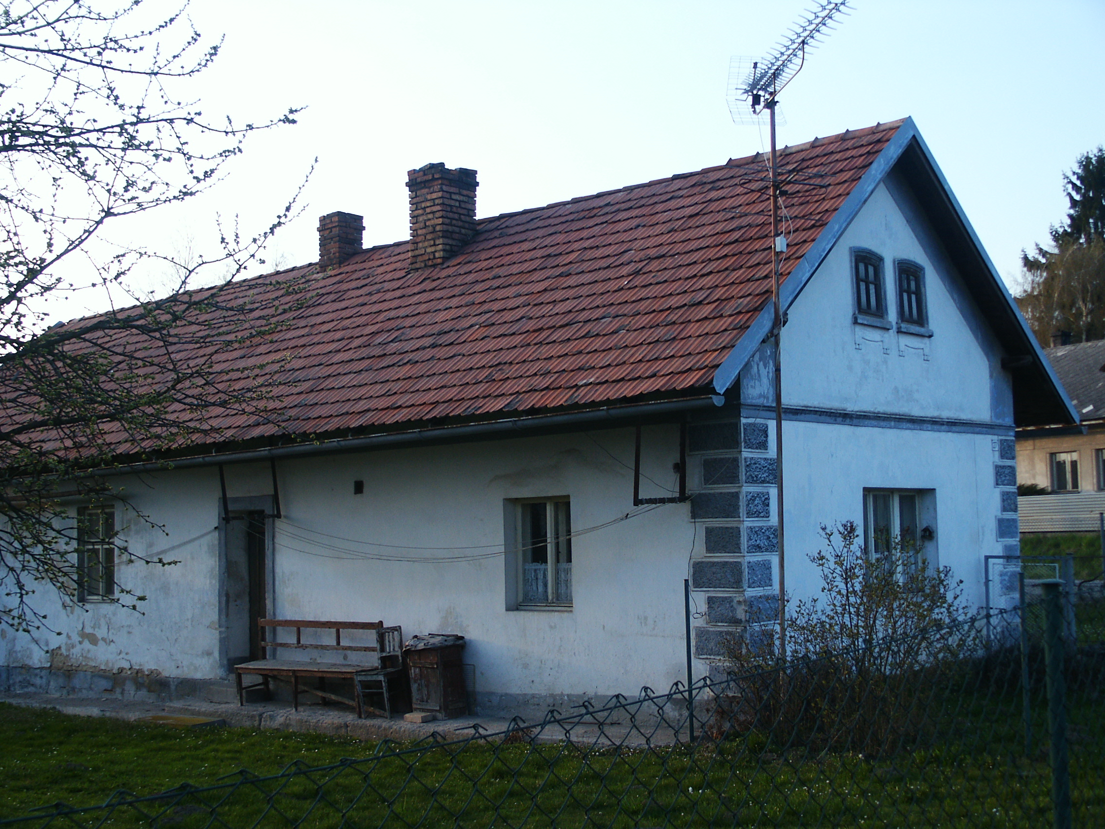 Ohaveč - č.p.27